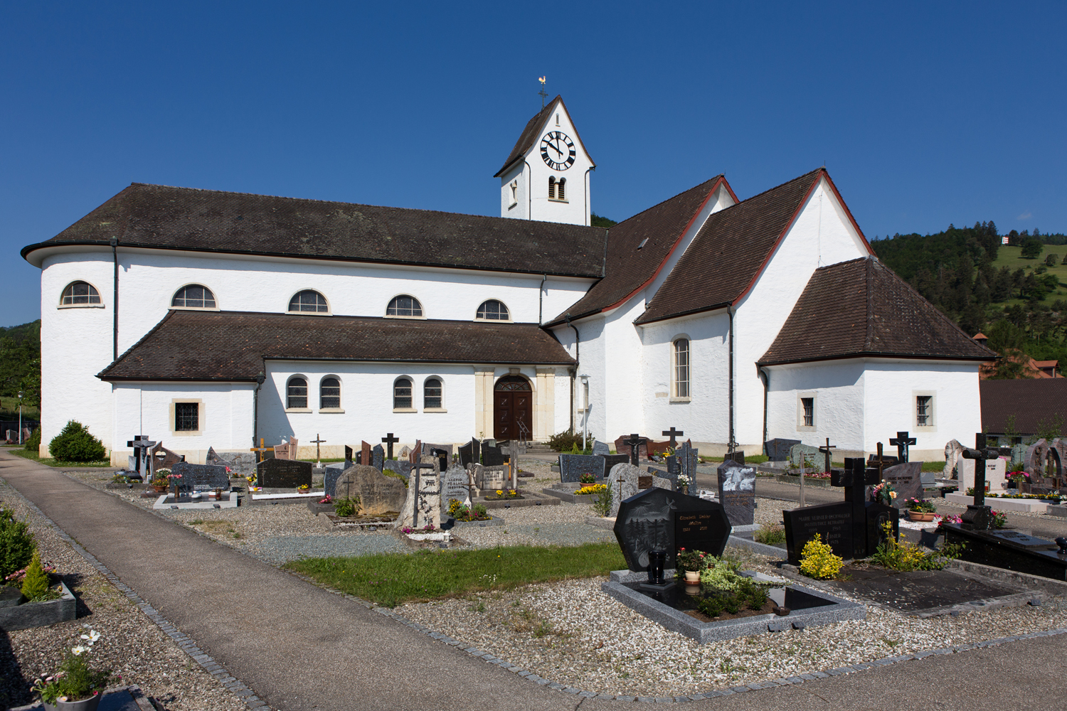 Pfarrkirche St-Maurice in Glovelier (JU)